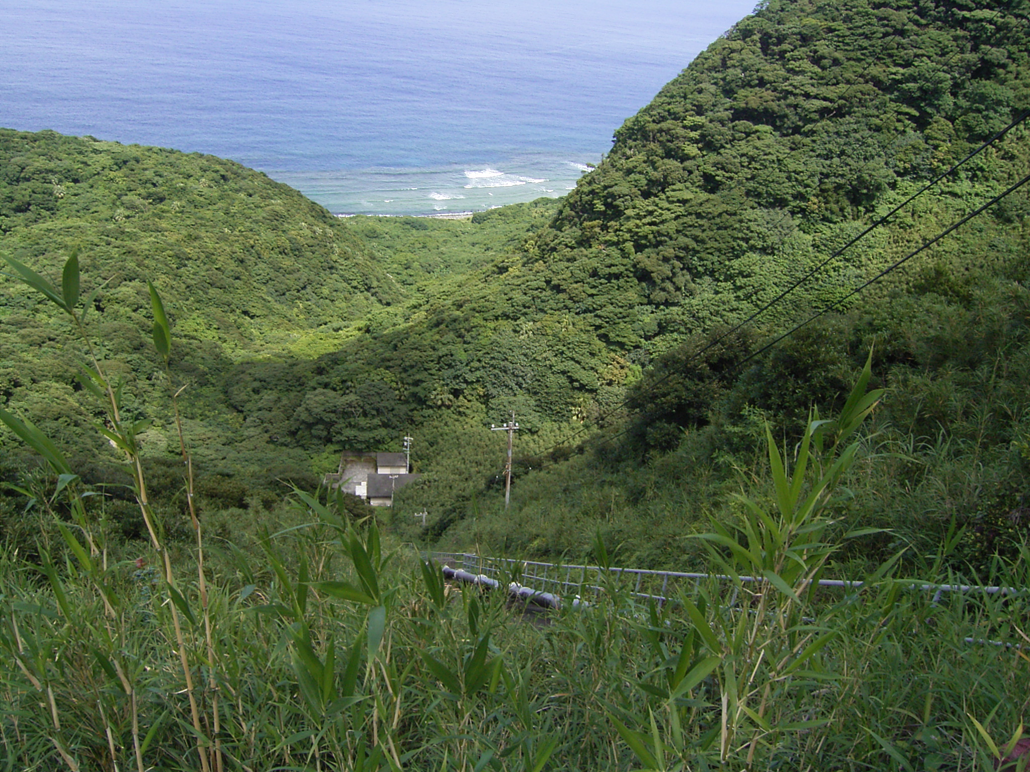 Oike penstock